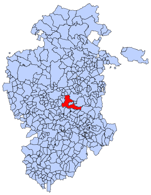 Ibeas de Juarros en Burgos